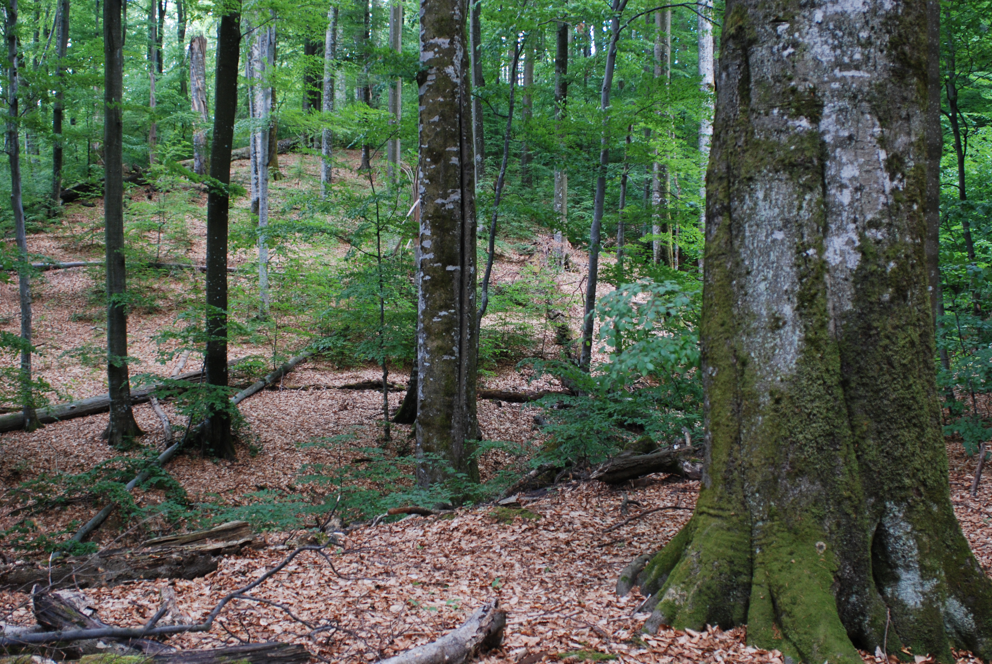 Buchenurwald Mala Ukolka mit wenig Unterwuchs